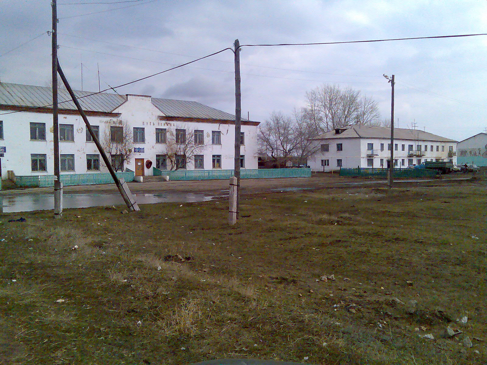 Houses in village Mikhailovka ((Abzelilovsky District, Bashkortostan) (Дома в Михайловке)